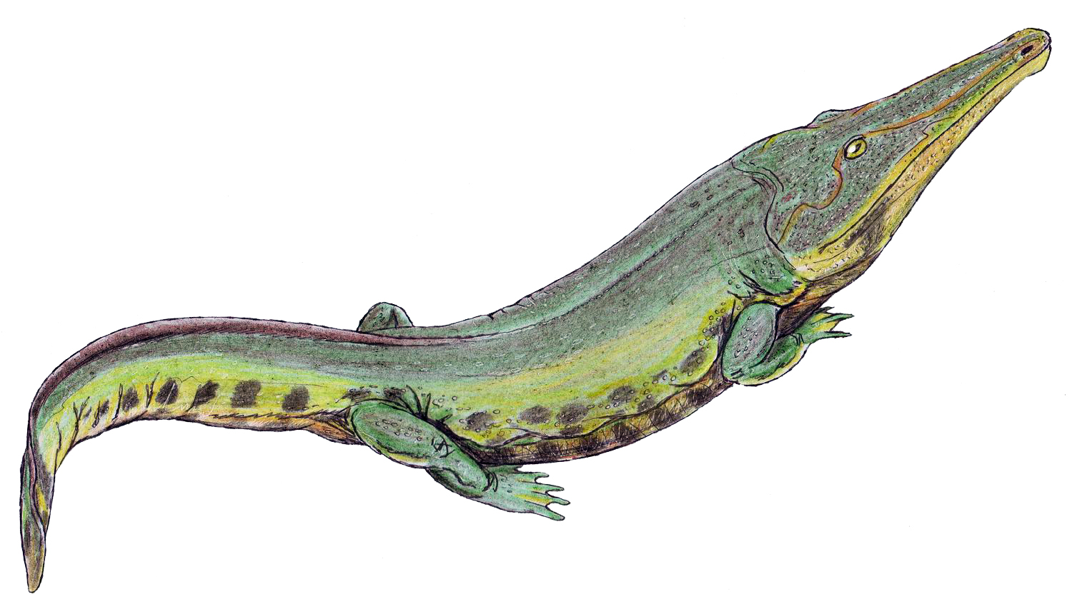 Eocyclotosaurus wellesi